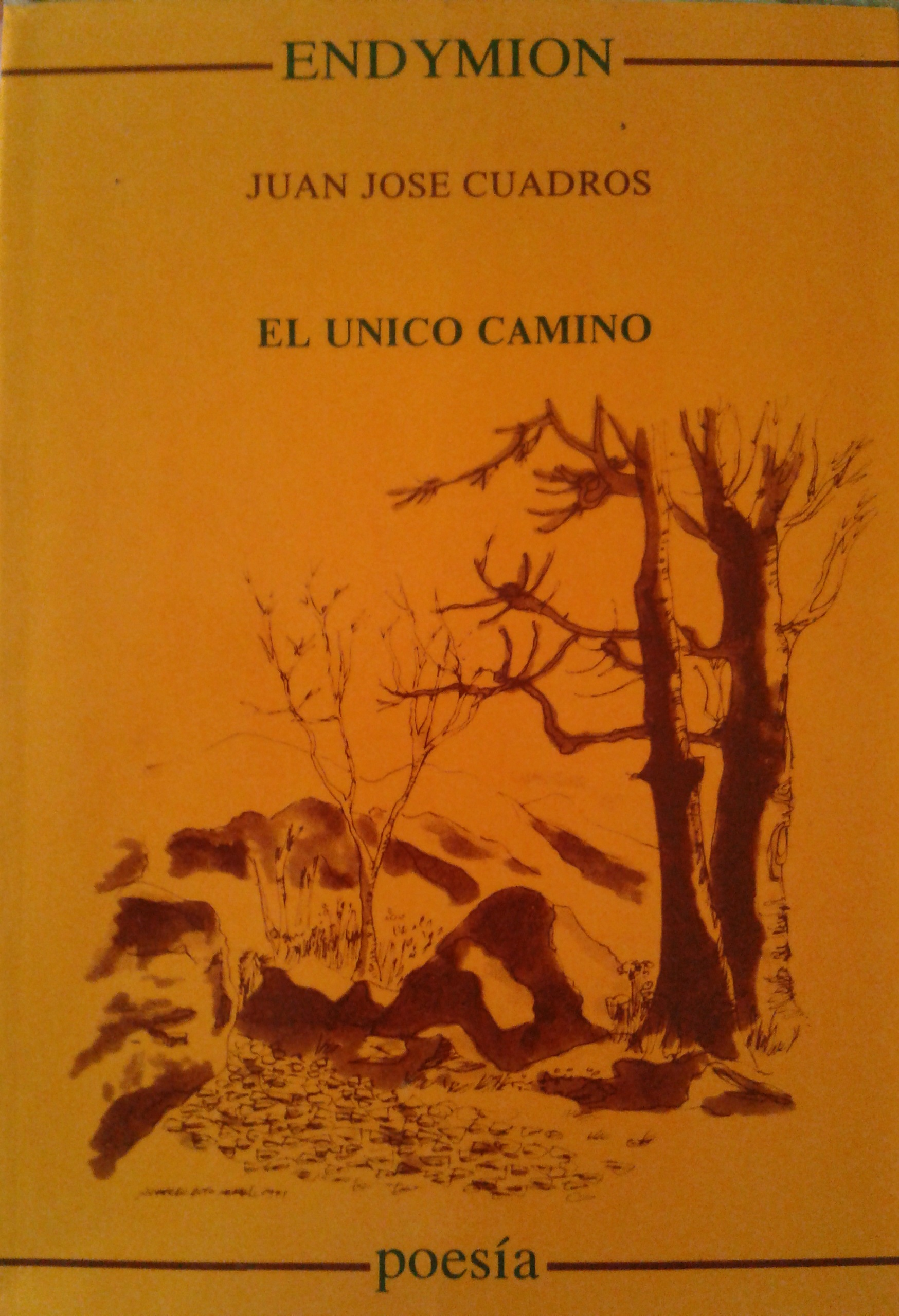 El único camino, de Juan José Cuadros